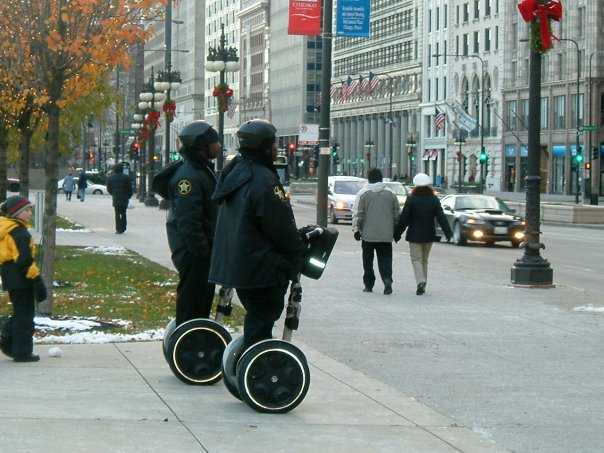 Chicago police en gyropode